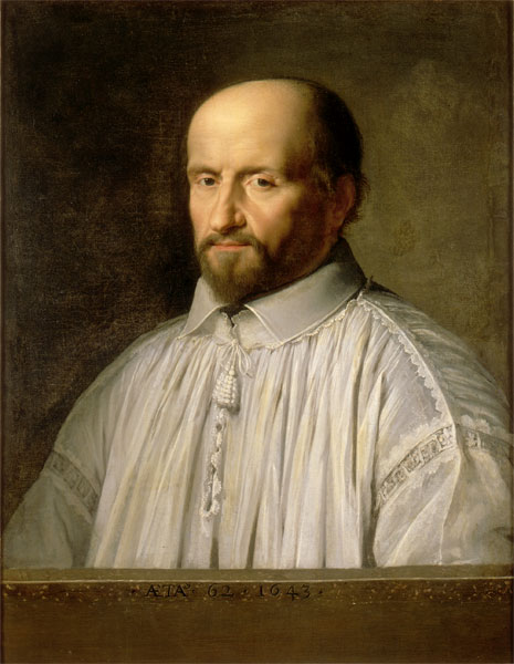 Jean Duvergier de Hauranne, abbé de Saint-Cyran, portrait après le masque mortuaire